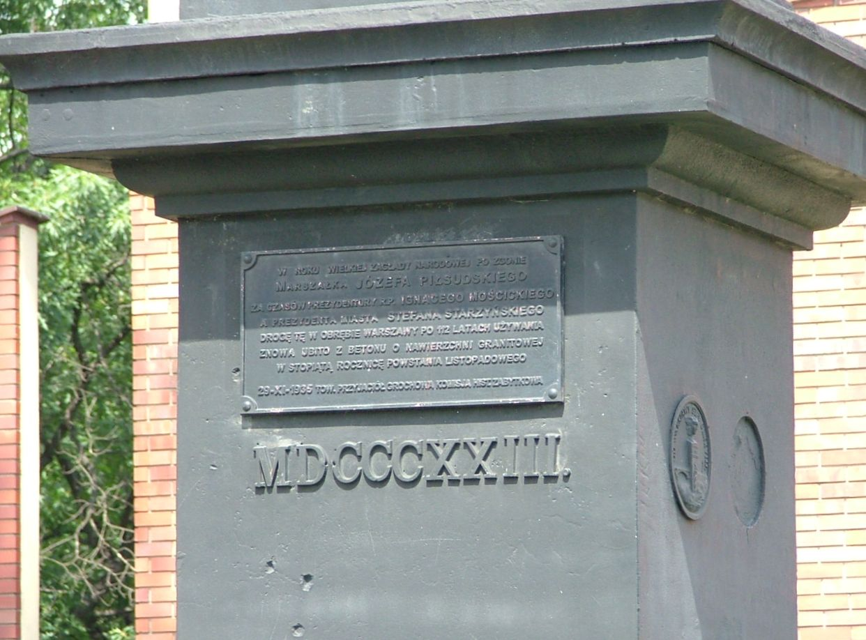 PL, Warsaw, Poland, Pomnik Budowy Szosy Brzeskiej, ul. Grochowska